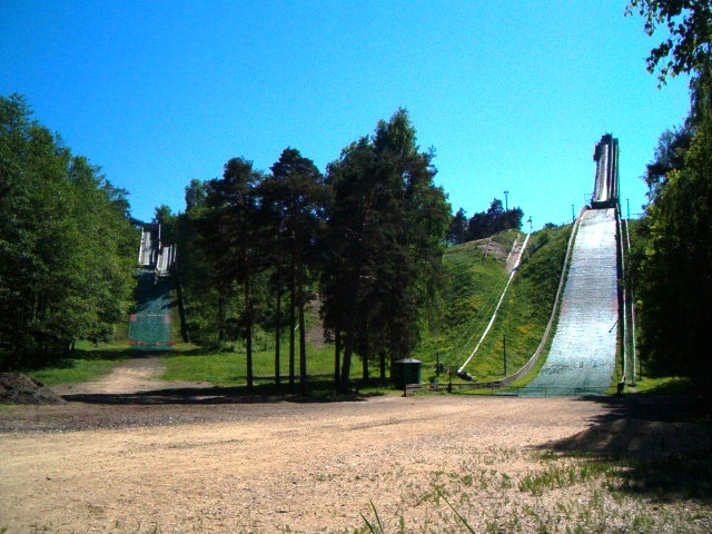 Mustamäe suusahüppetornid.